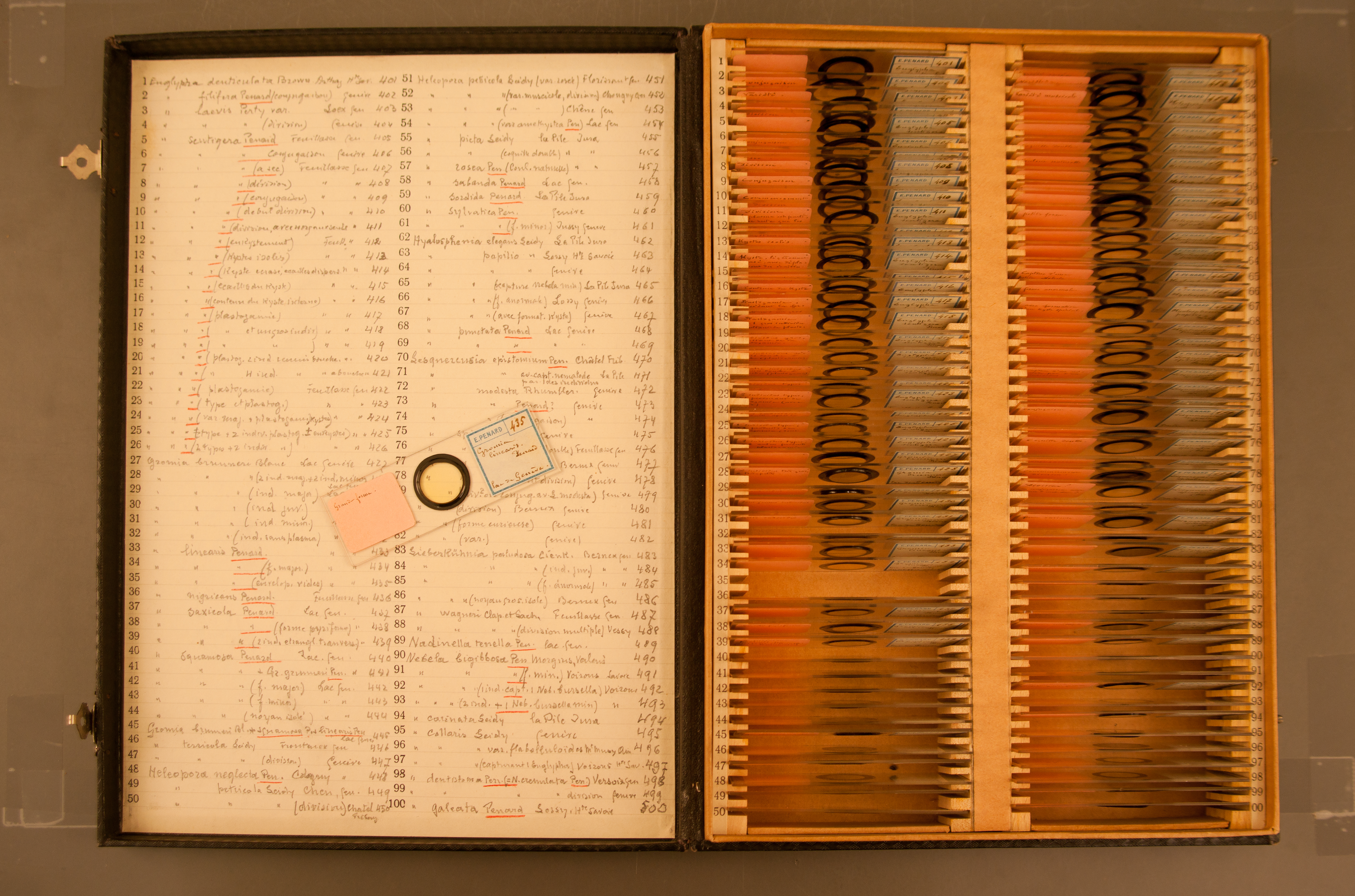 Penard - boite - 2